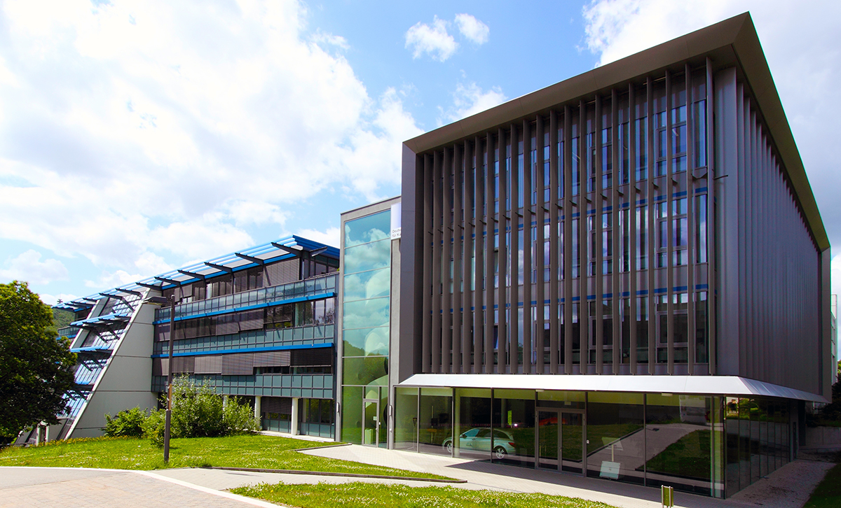 DFKI-Hauptgebäude, Standort Saarbrücken